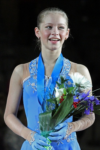 Юлия Липницкая на подиуме финала Гран-при среди юниоров 2-11-2012